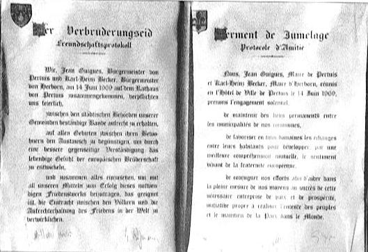 Photo, puis scan de l'archive du serment de jumelage Pertuis-Herborn en 1965